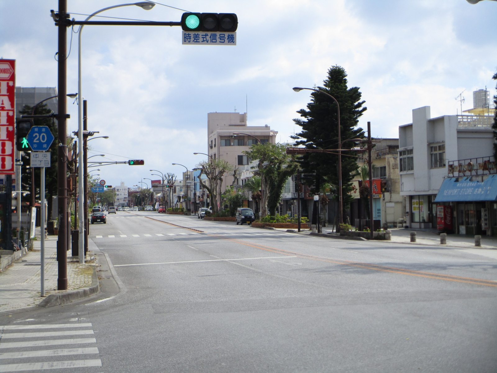 沖縄県道20号胡屋泡瀬線（沖縄県沖縄市中央二丁目より撮影）